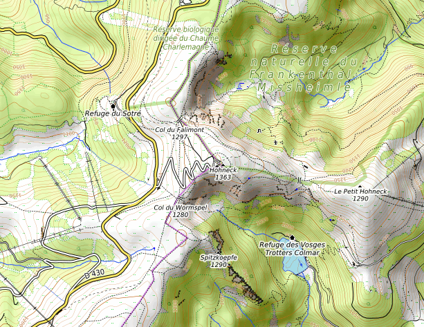 carte réalisée sur umap This map may be incomplete, and may contain errors. Don't rely solely on it for navigation.